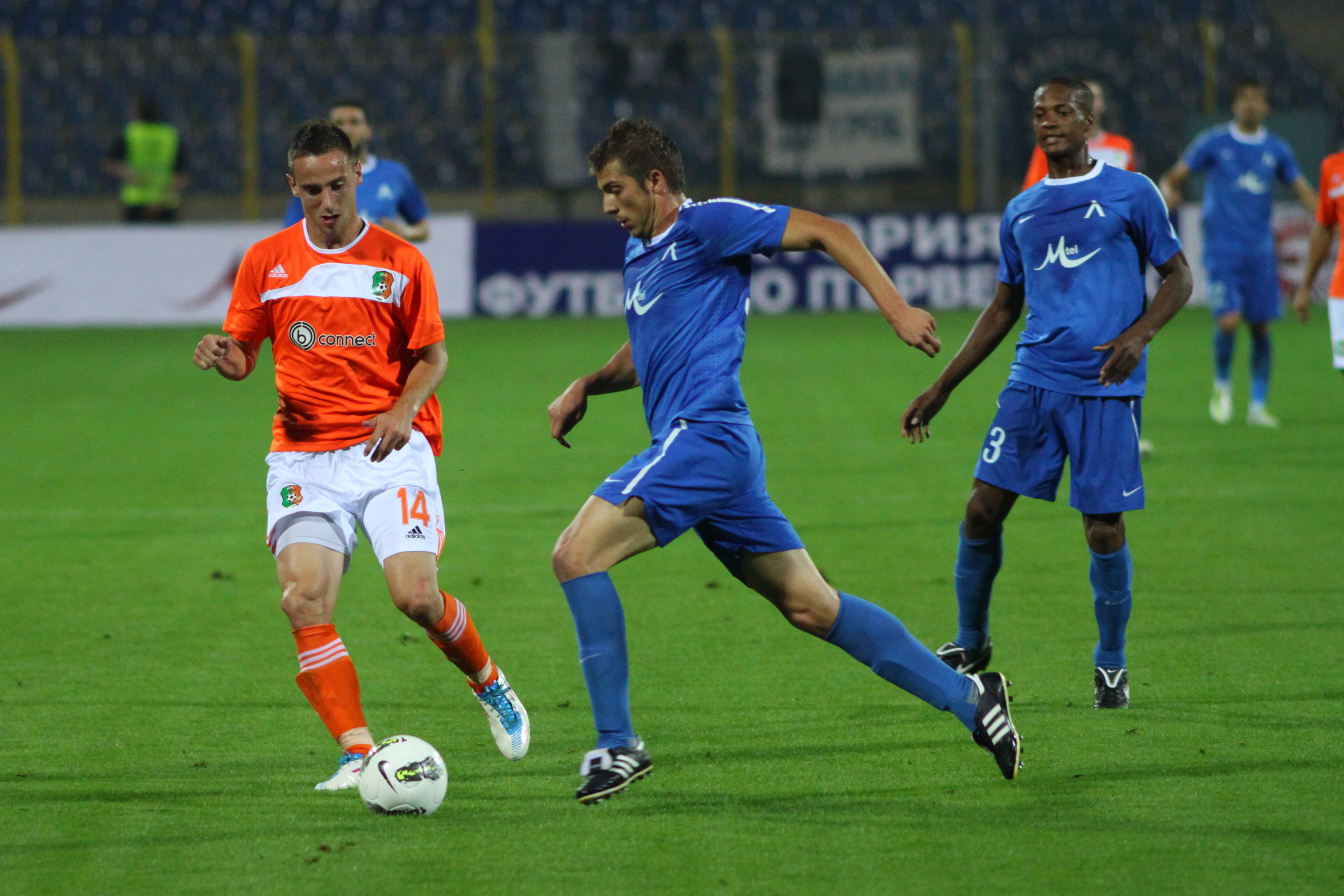 Йордан Милиев от Левски Сф в акция. Момент от футболната среща Левски Сф-Литекс 3-2, 17 септември 2011 г.